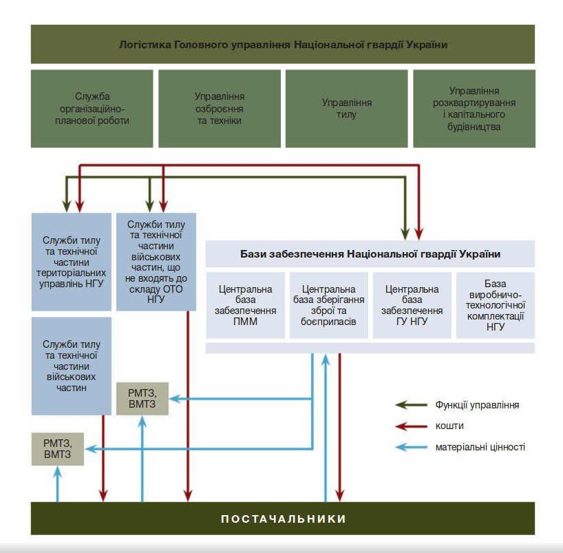 Національна гвардія України, Структура логістики